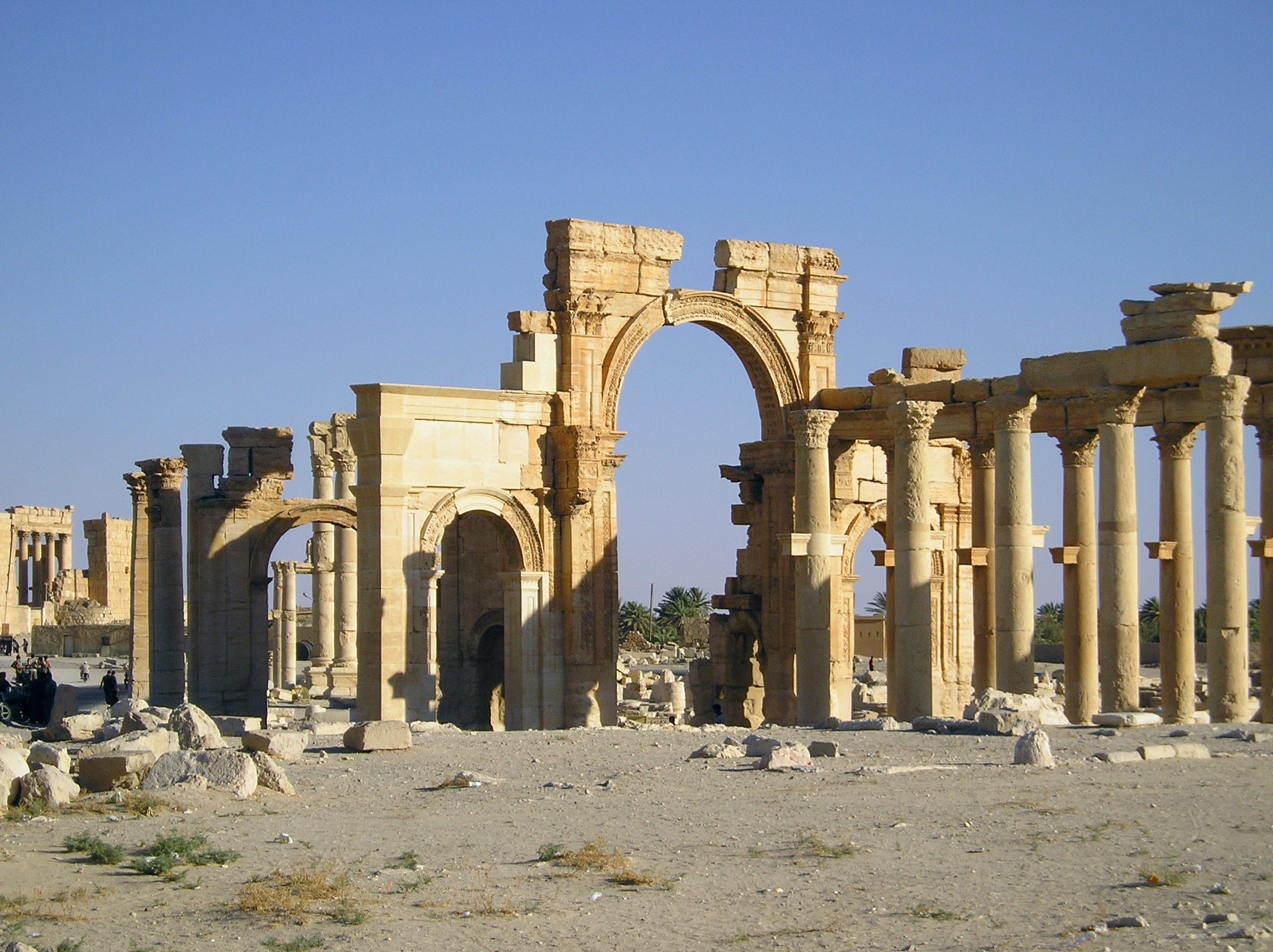 Ruiny Palmyry leżącej na Pustynii Syryjskiej na obrzeżach miejscowości Tadmur. Autor Aotearoa